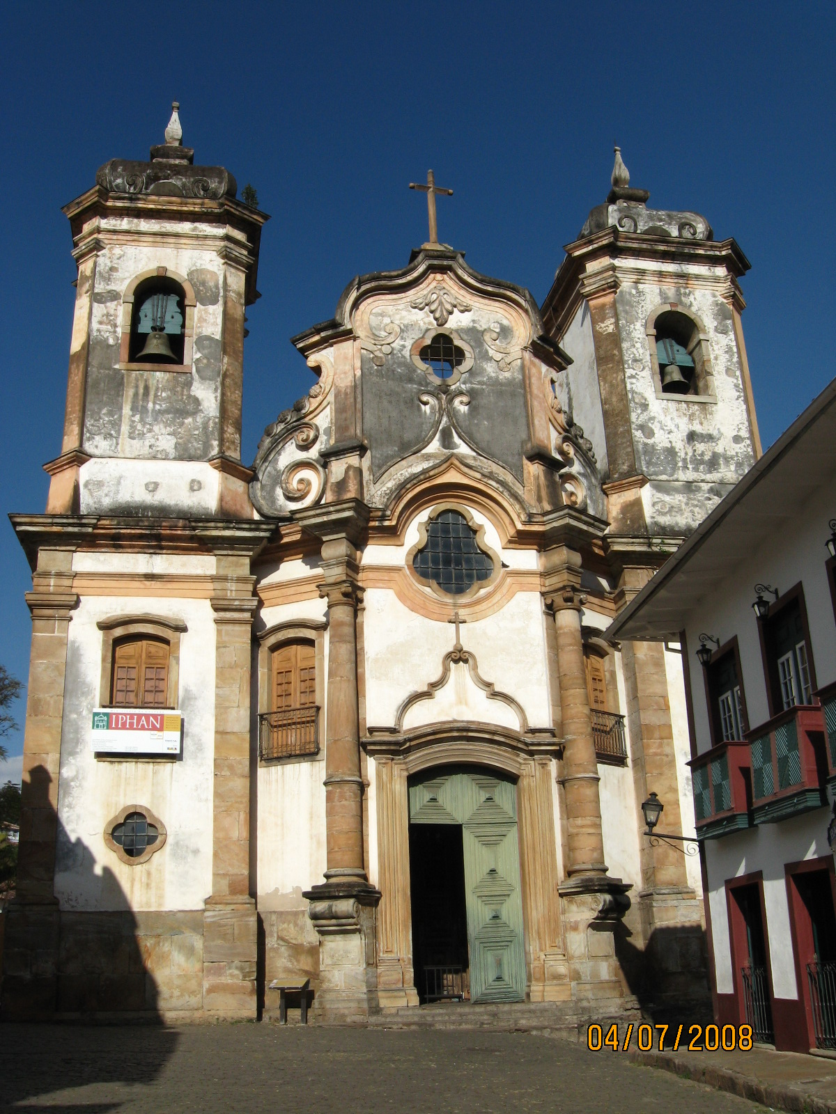 Igreja Pilar Ouro Preto Minas Gerais